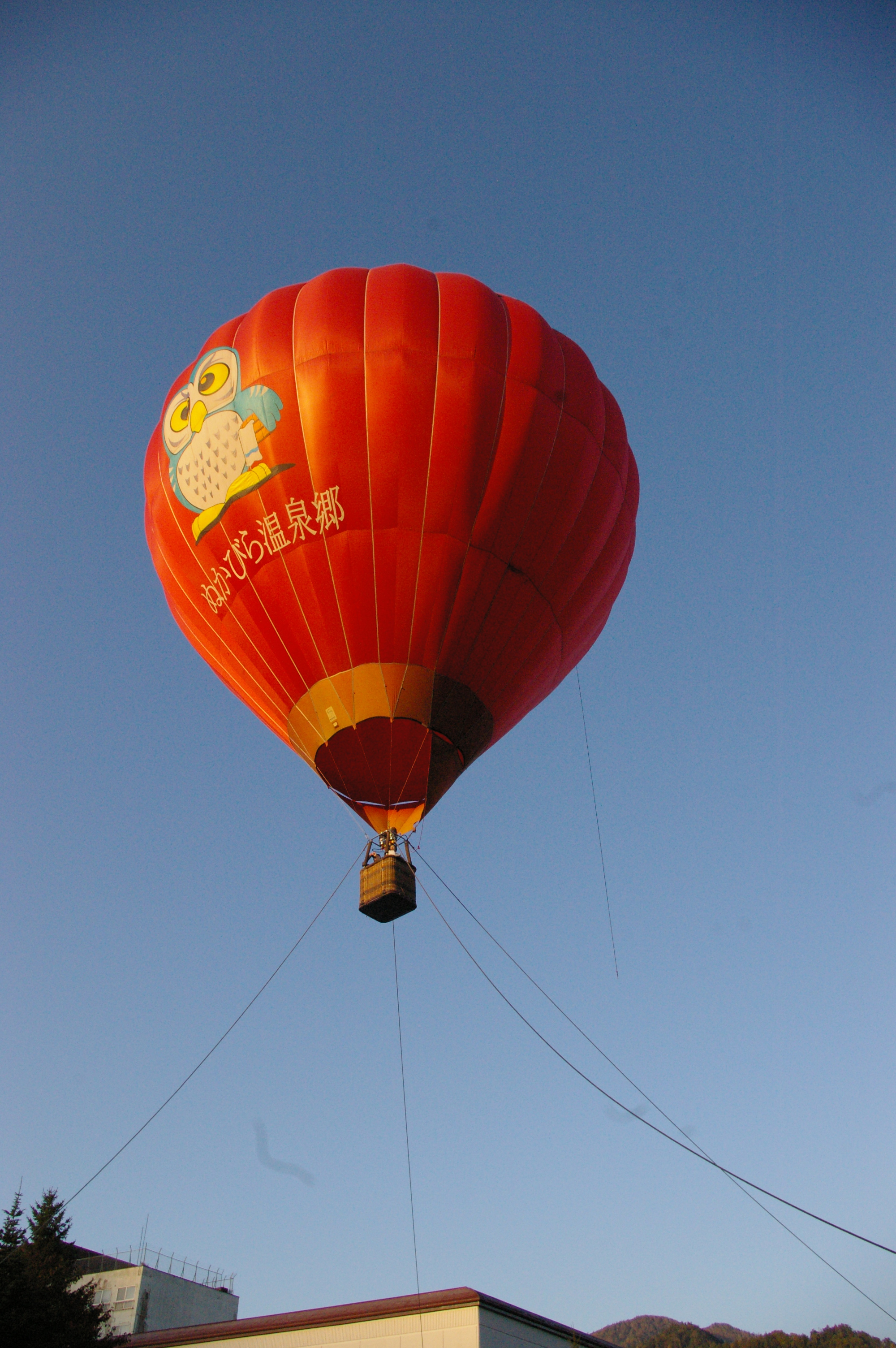 糠平温泉での熱気球体験搭乗